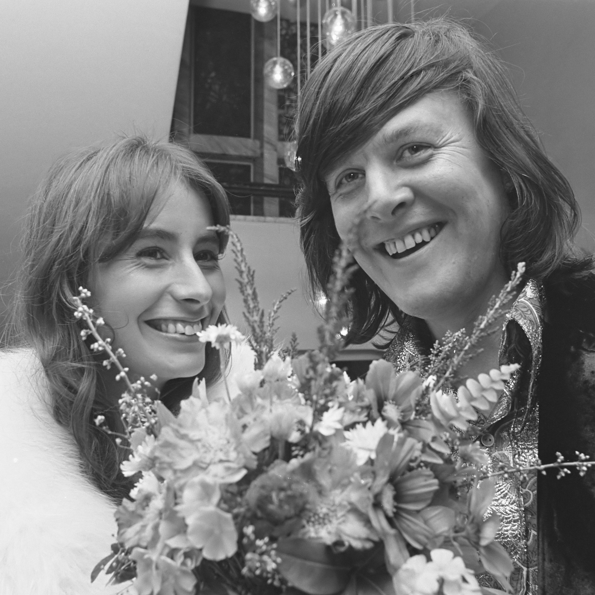 Actrice Josine van Dalsum en regisseur John van de Rest gehuwd in Amsterdam 5 september 1974